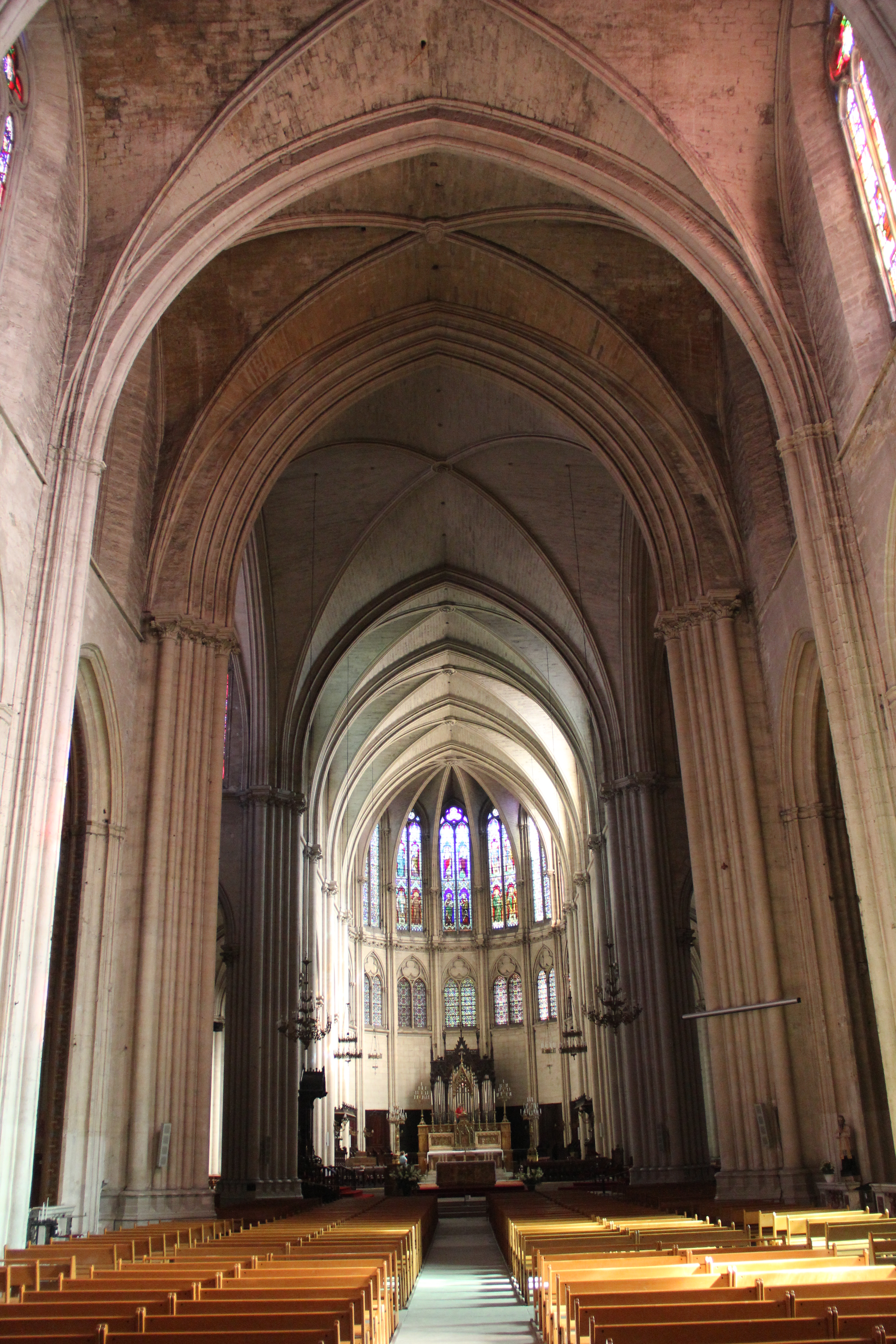 Inside the Cathédrale Saint-Pierre